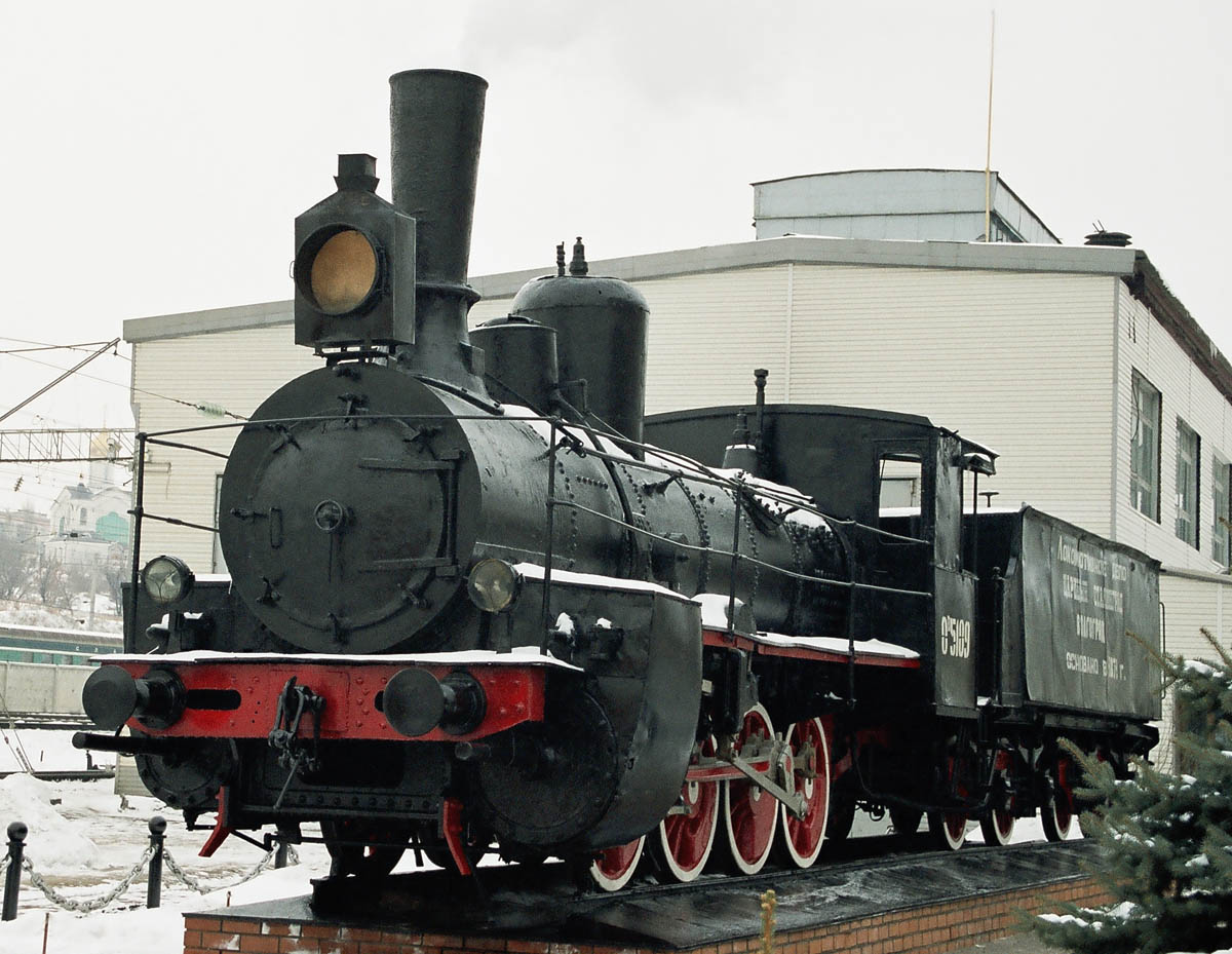 Паровоз серии Ов у локомотивного депо Волгоград